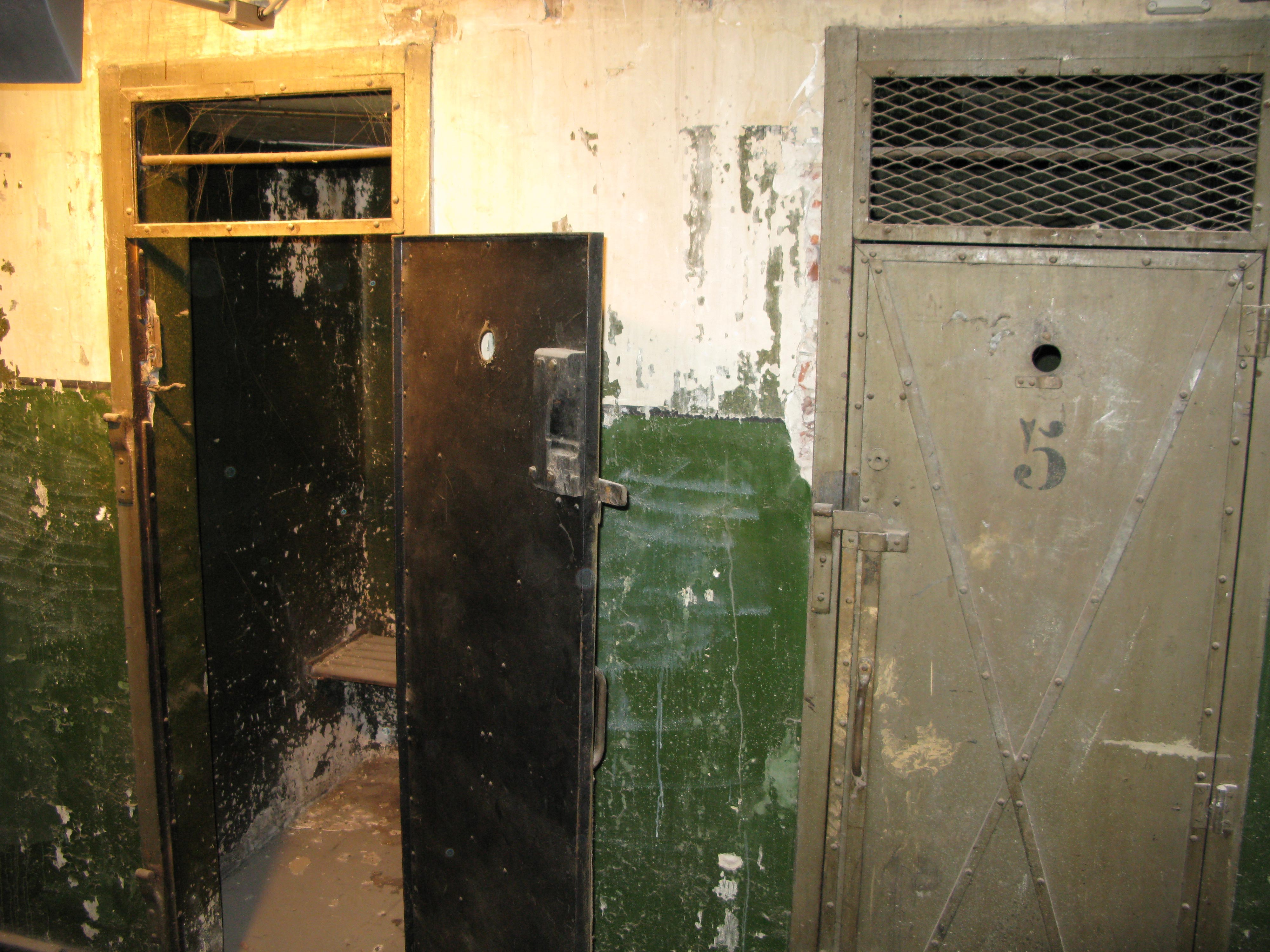 Diese Zellen wurden während des Zweiten Weltkrieges von der Deutschen Militärpolizei verwendet. Sie befinden sich im Keller des Museums